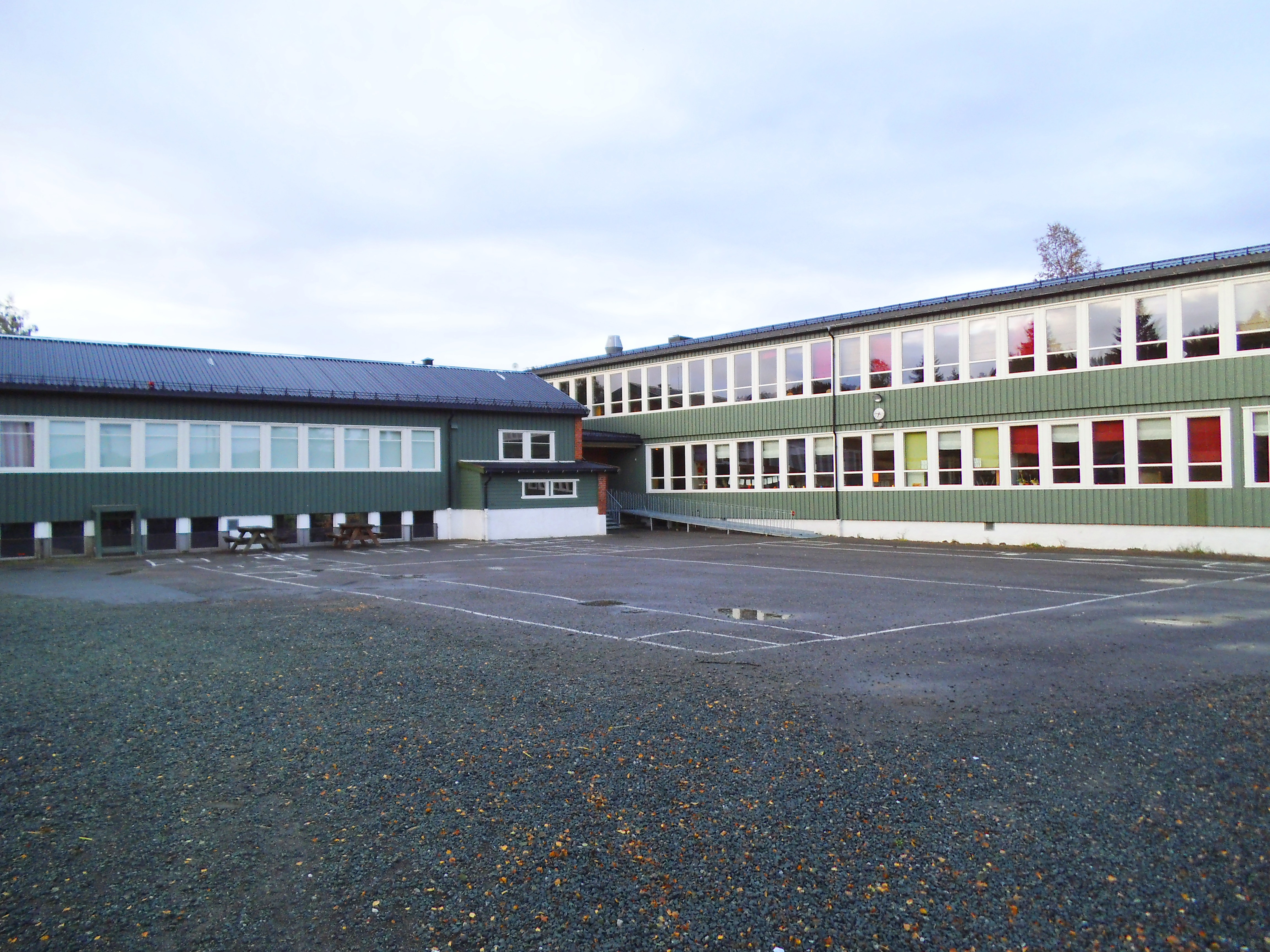 Den delen av skolen som huser barneskolen (Elementary school in Korsvegen).